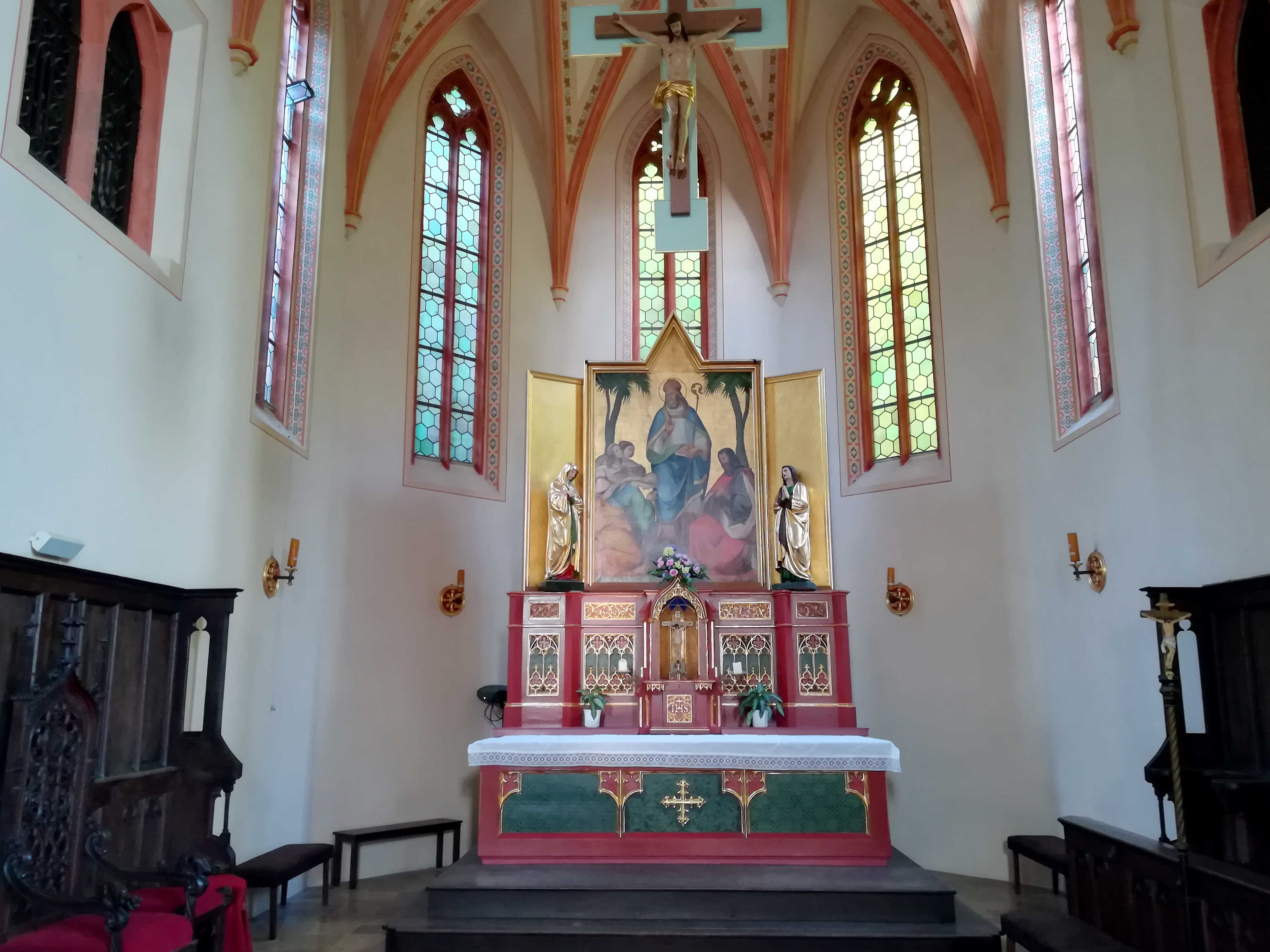 Die römisch-katholische Pfarrkirche St. Nikolaus in Bad Abbach ist ein neugotischer Kirchenbau, der in den Jahren 1849 bis 1852 anstelle eines barocken Vorgängerbaus errichtet wurde.